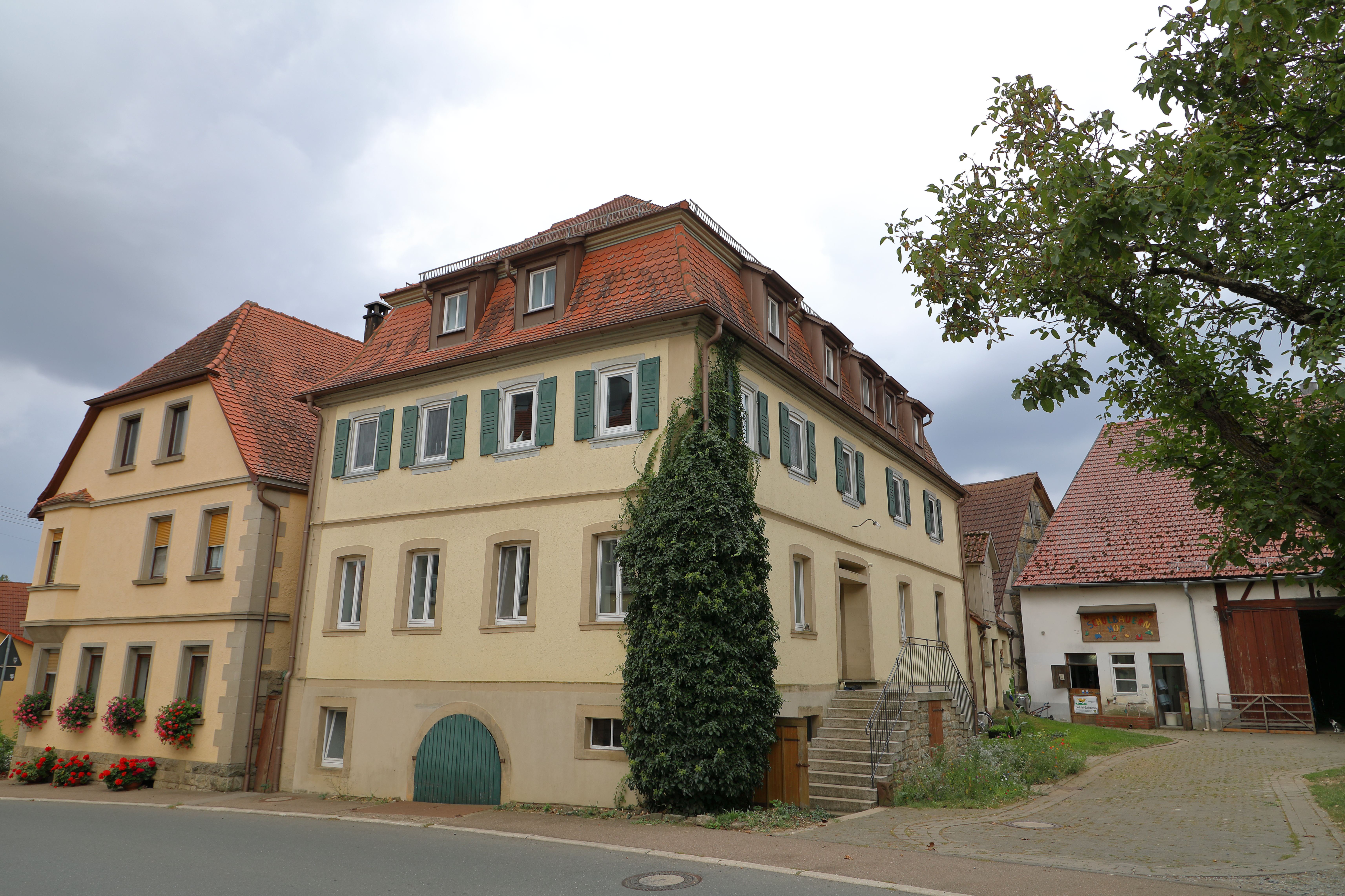 Der "Schulbauernhof Pfitzingen" ist eine Bildungseinrichtung des Landes Baden-Württemberg. Er ist u.a. in den denkmalgeschützten Gebäuden Pfitzingen 14 und Pfitzingen 41, dem "Schlösschen Pfitzingen" untergebracht.